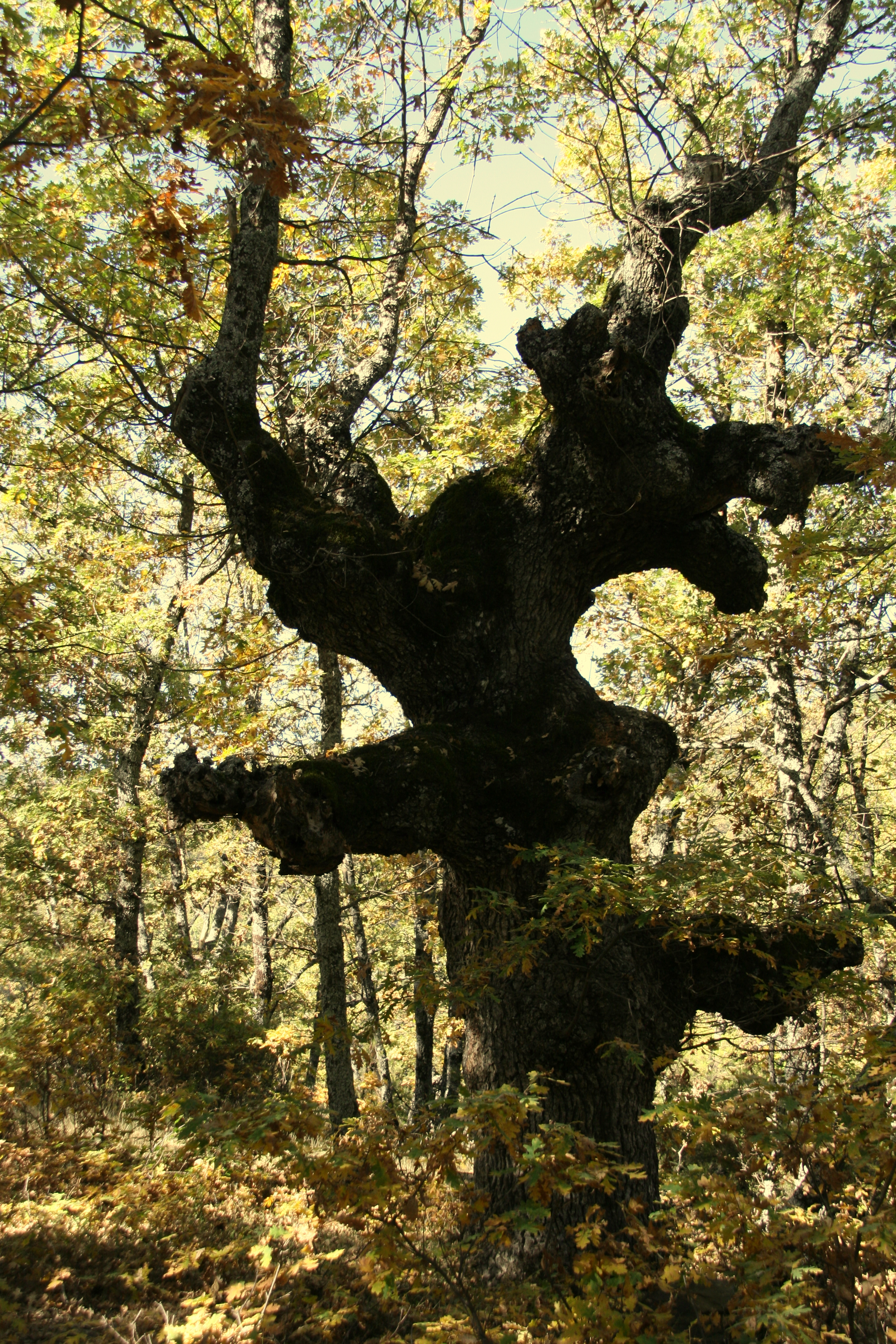 Senda de los Robles Centenarios en Puebla de la Sierra This is a photography of a Special Area of Conservation in Spain with the ID: ES3110002. Natura2000 entry, EEA entry